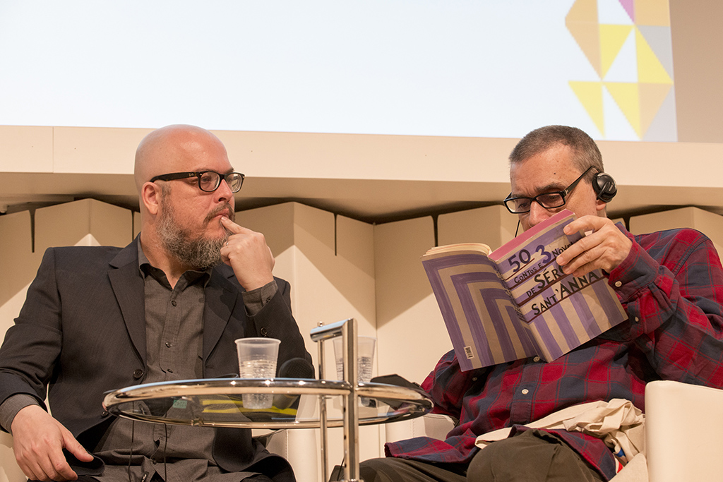 Alemanha | A participação do Brasil na Feira de Frankfurt se deu por meio dos ministérios da Cultura e Relações Exteriores, FBN, Fundação Nacional de Artes (Funarte), Câmara Brasileira do Livro, com apoio da Embratur, Agência Brasileira de Promoção de Exportações e Investimentos (Apex-Brasil) e Sesc São Paulo. bit.ly/1clVotx Foto: Johan Visbeek